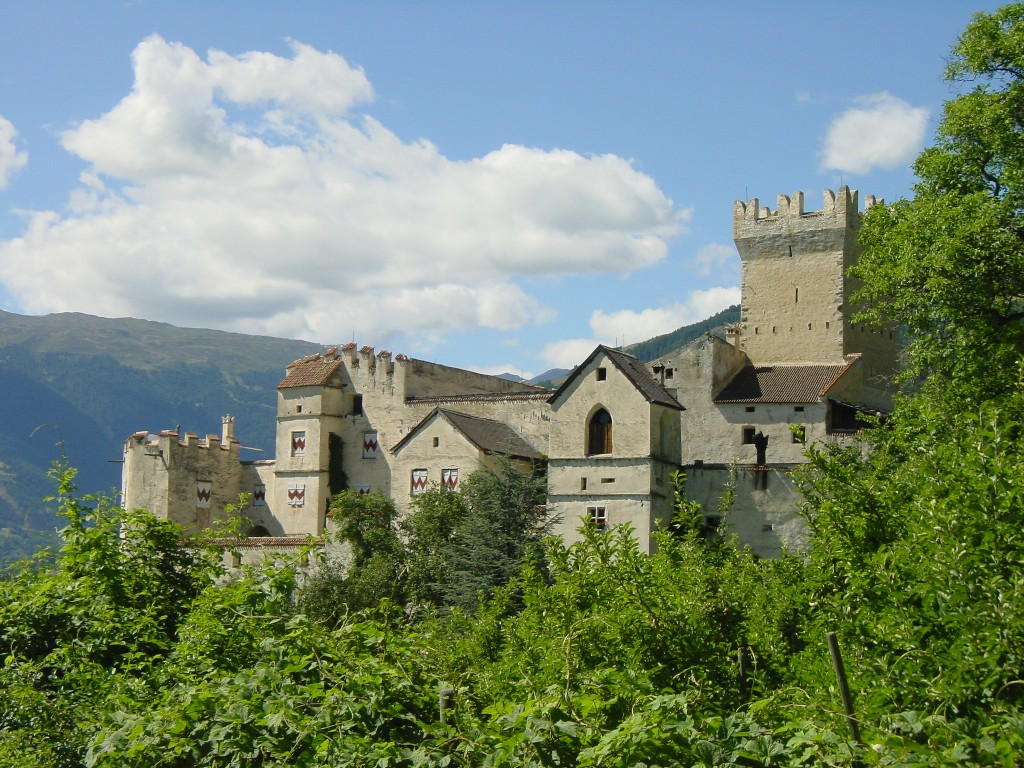 Churburg Südtirol (IT)